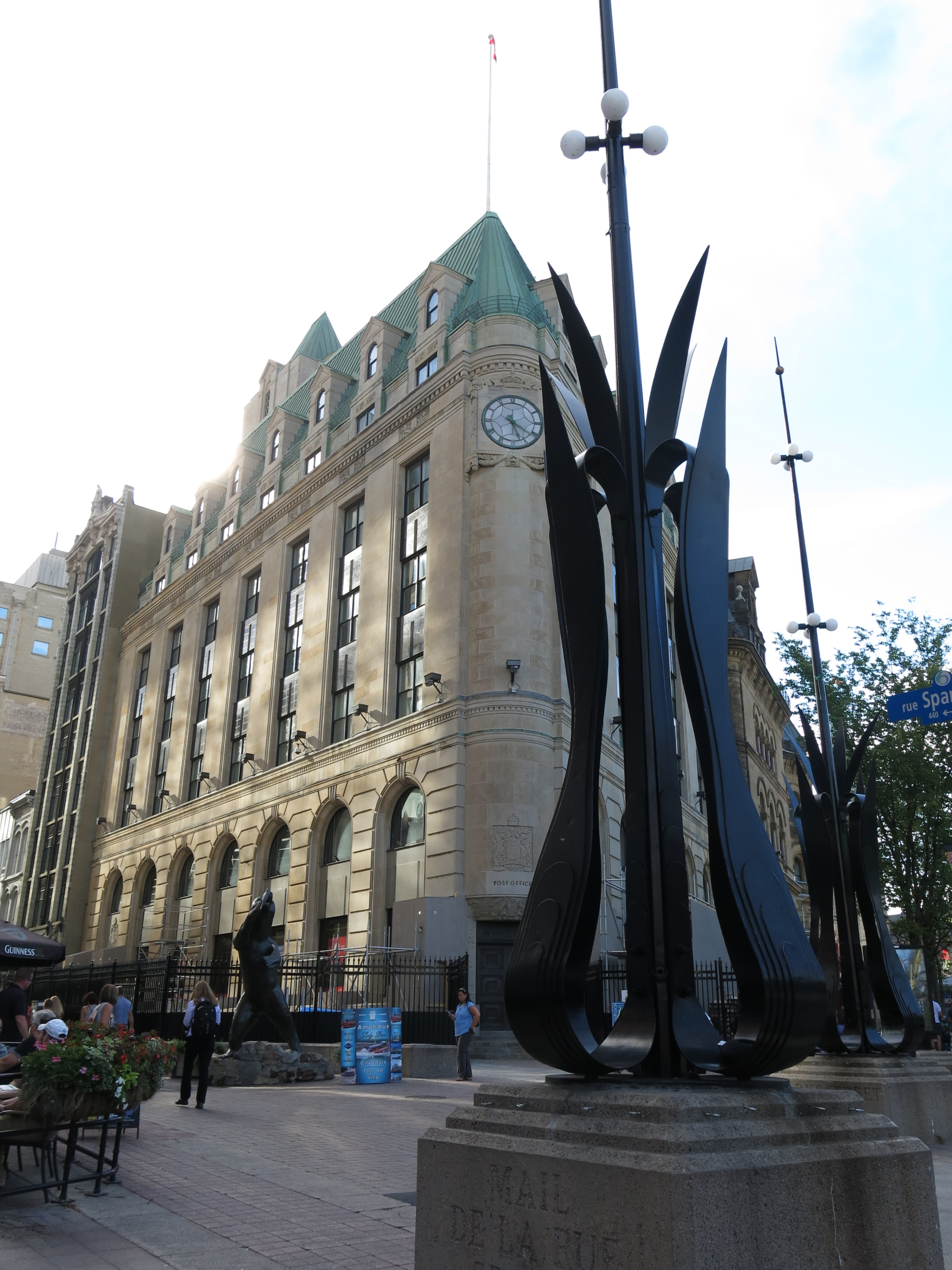 Succursale postale B, 47-59 Sparks Street, Ottawa (Canada). (Protection Classified Federal Heritage Building. Voir la liste des lieux patrimoniaux d'Ottawa pour plus de détails).